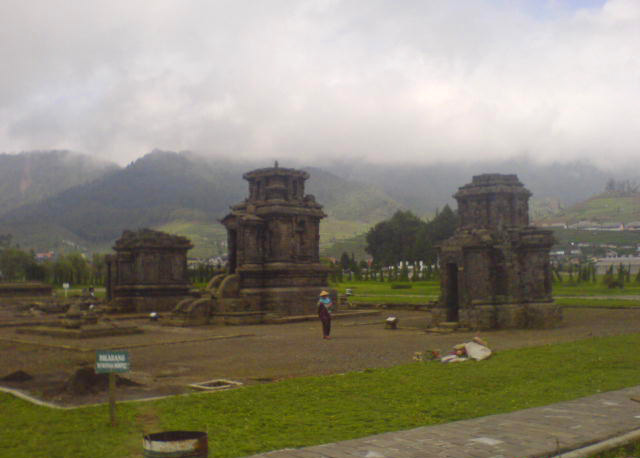 Dieng temple complex